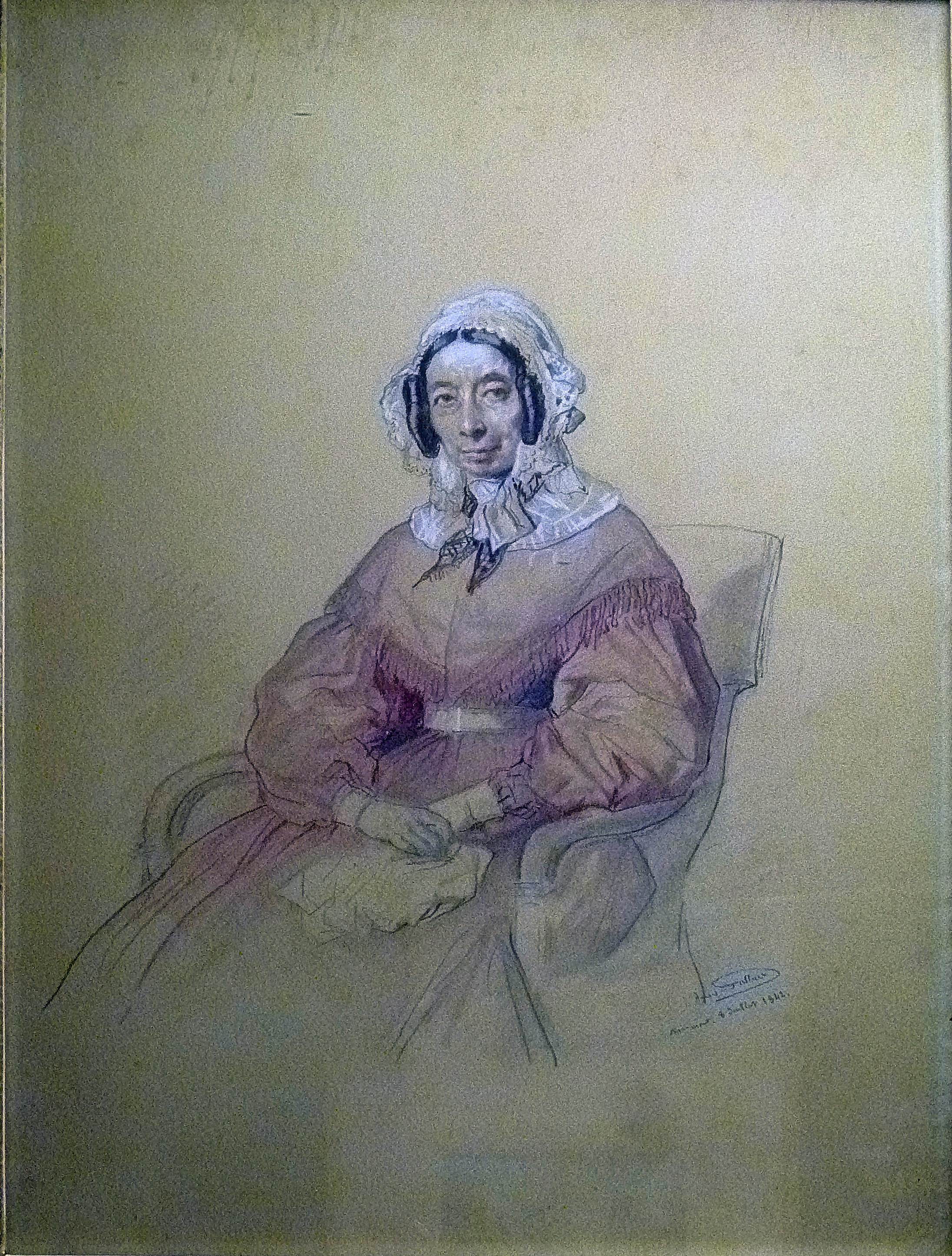 Madame Nicolas Warocqué, née Cécile Desvignes (1773-1861), dessin rehaussé par Louis Gallait (1842); collection du Musée de Mariemont, Belgique